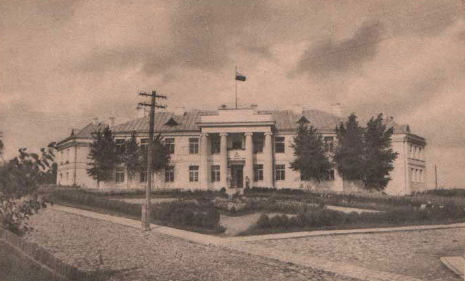 Беларуская (тарашкевіца): Браслаў (Brasłaŭ), рог вуліц Садовай (vulica Sadovaja) і Пясковай (vulica Piaskovaja). Староства